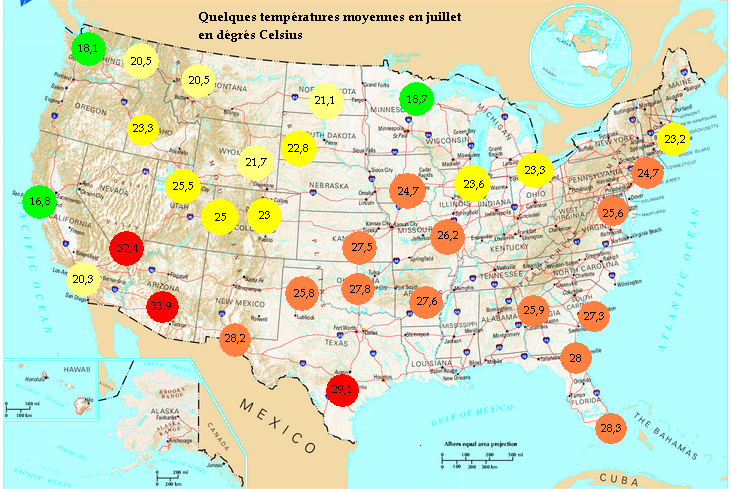 Carte des températures moyennes en juillet aux États-Unis. Carte File:National-atlas-general-reference-map-USA.png, modifiée avec Paint, Urban, 2005